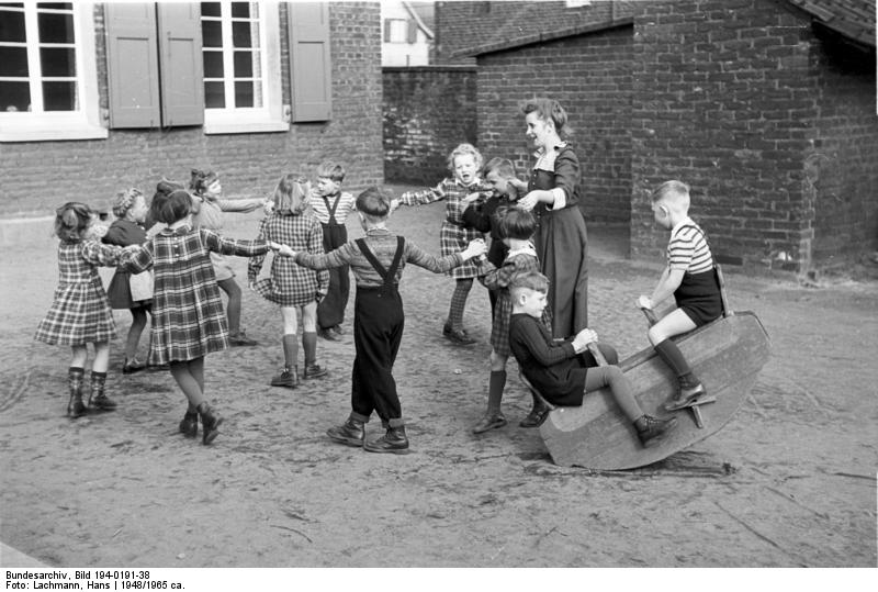 Kindergarten, Kinderheim